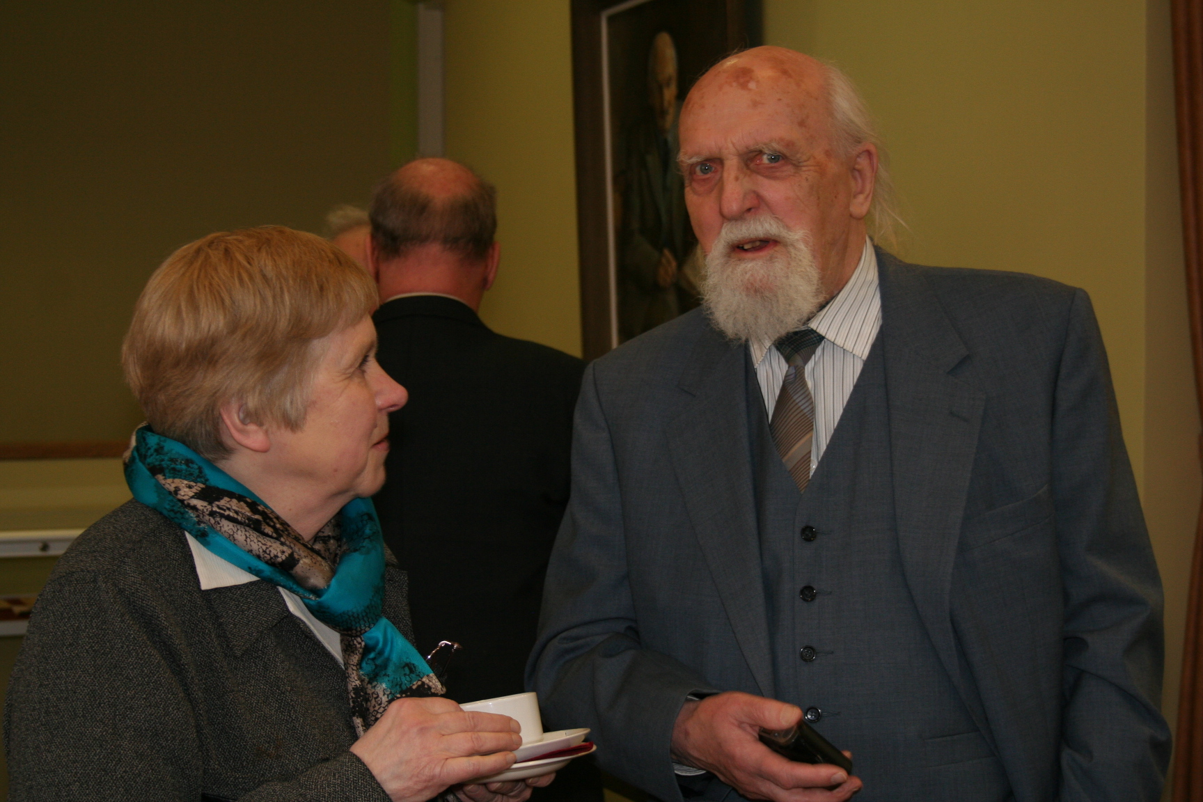 Mall Jõgi ja Henn-Kaarel Hellat Kirjanike Liidu üldkogu Tartus 23. märtsil 2012.